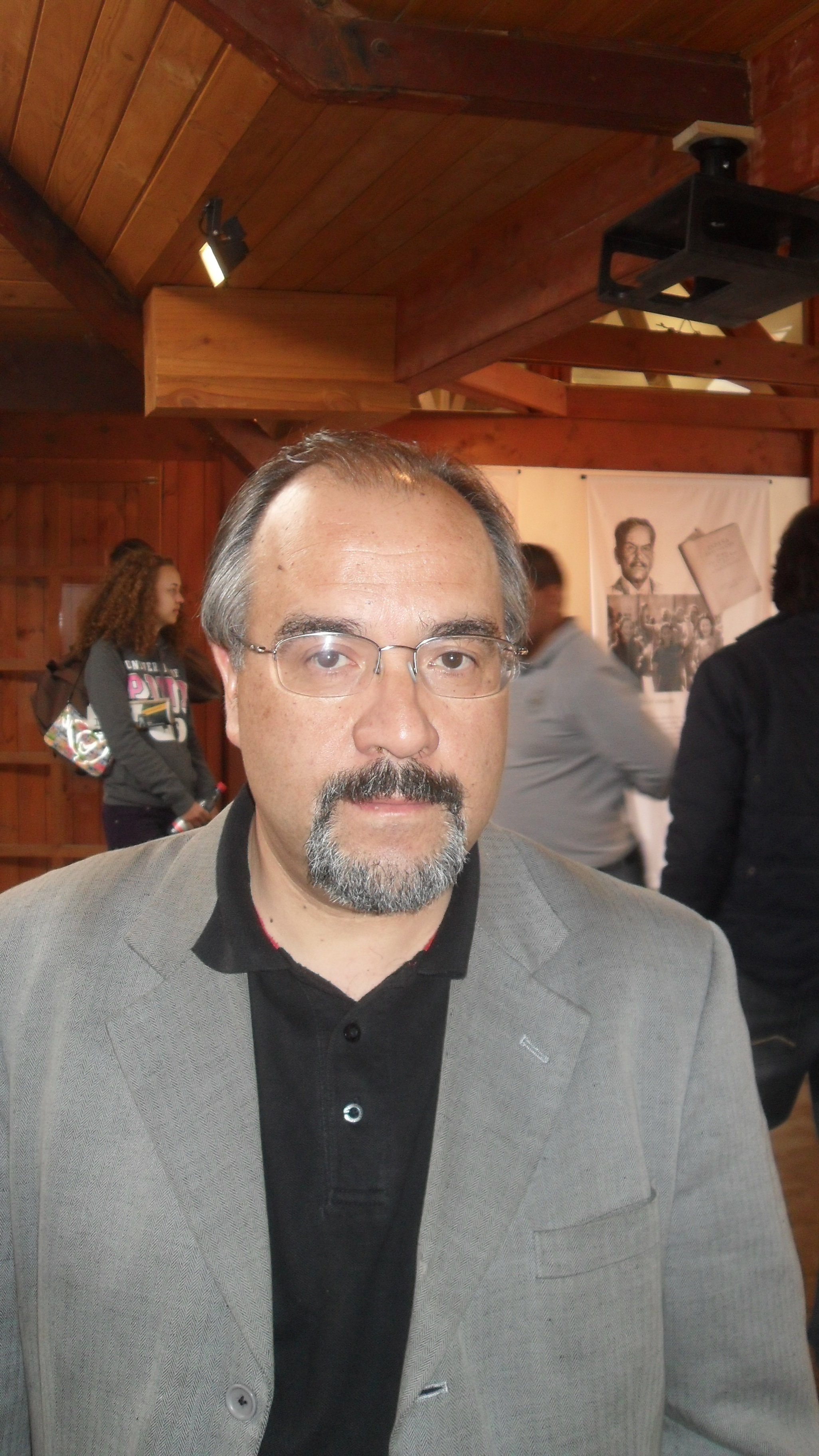 El escritor chileno Ramón Díaz Eterovic en la casa museo de Pablo Neruda en Isla Negra durante Santiago Negro.